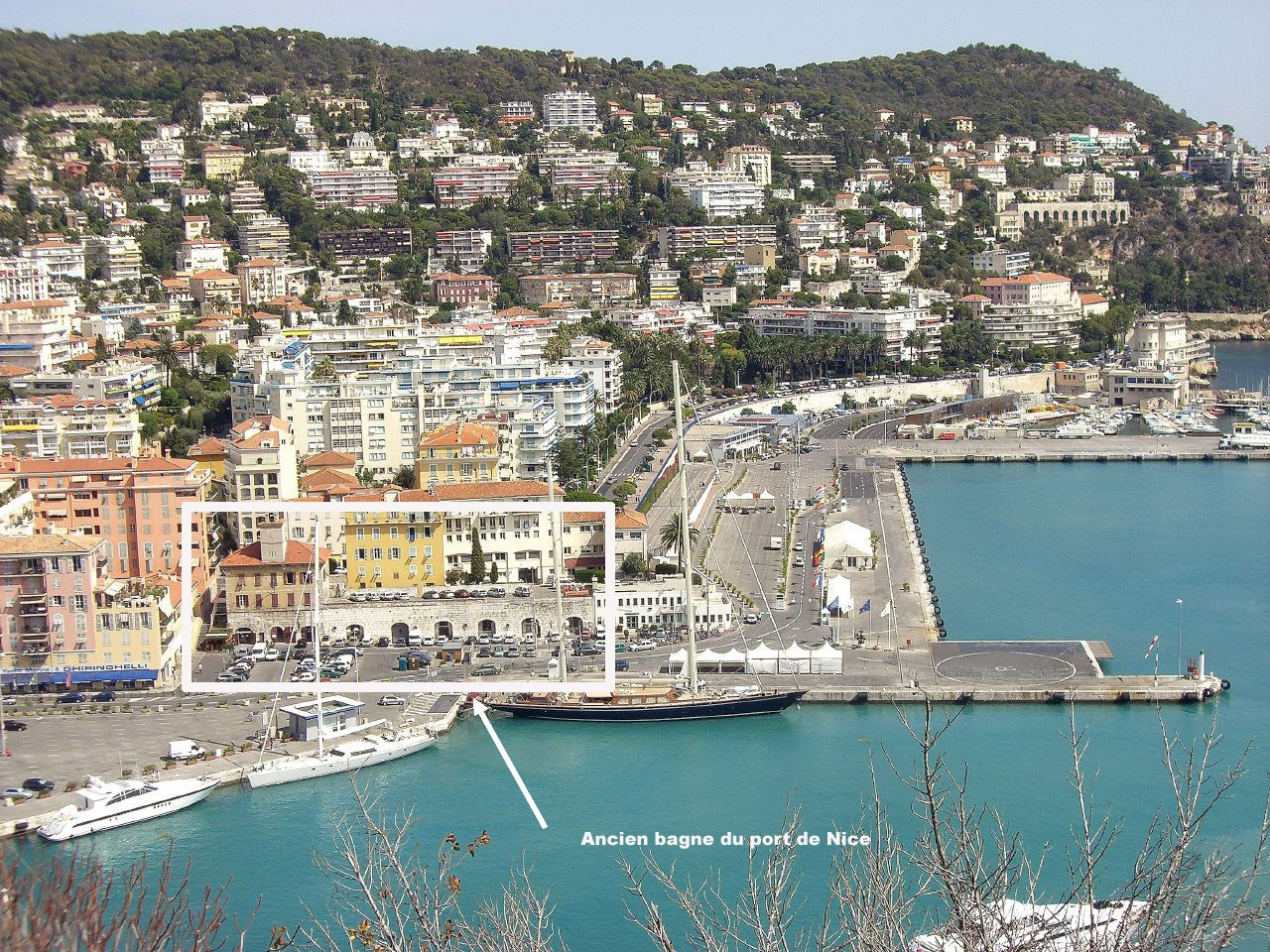 Le côté est du port de Nice vu depuis la colline du château. La partie encadrée represente les vestiges de l'ancien bagne du port.